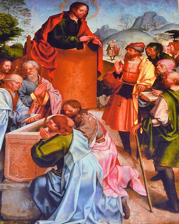 A Pregação de São Tiago é uma pintura a óleo sobre madeira pintada no período de 1520 a 1525 presumivelmente pelo pintor que se designa por Mestre da Lourinhã, mede 127 cms de altura e 83,5 cms de largura, fazia parte do Políptico da Igreja do Convento de Santiago, e encontra-se actualmente no Museu Nacional de Arte Antiga, em Lisboa